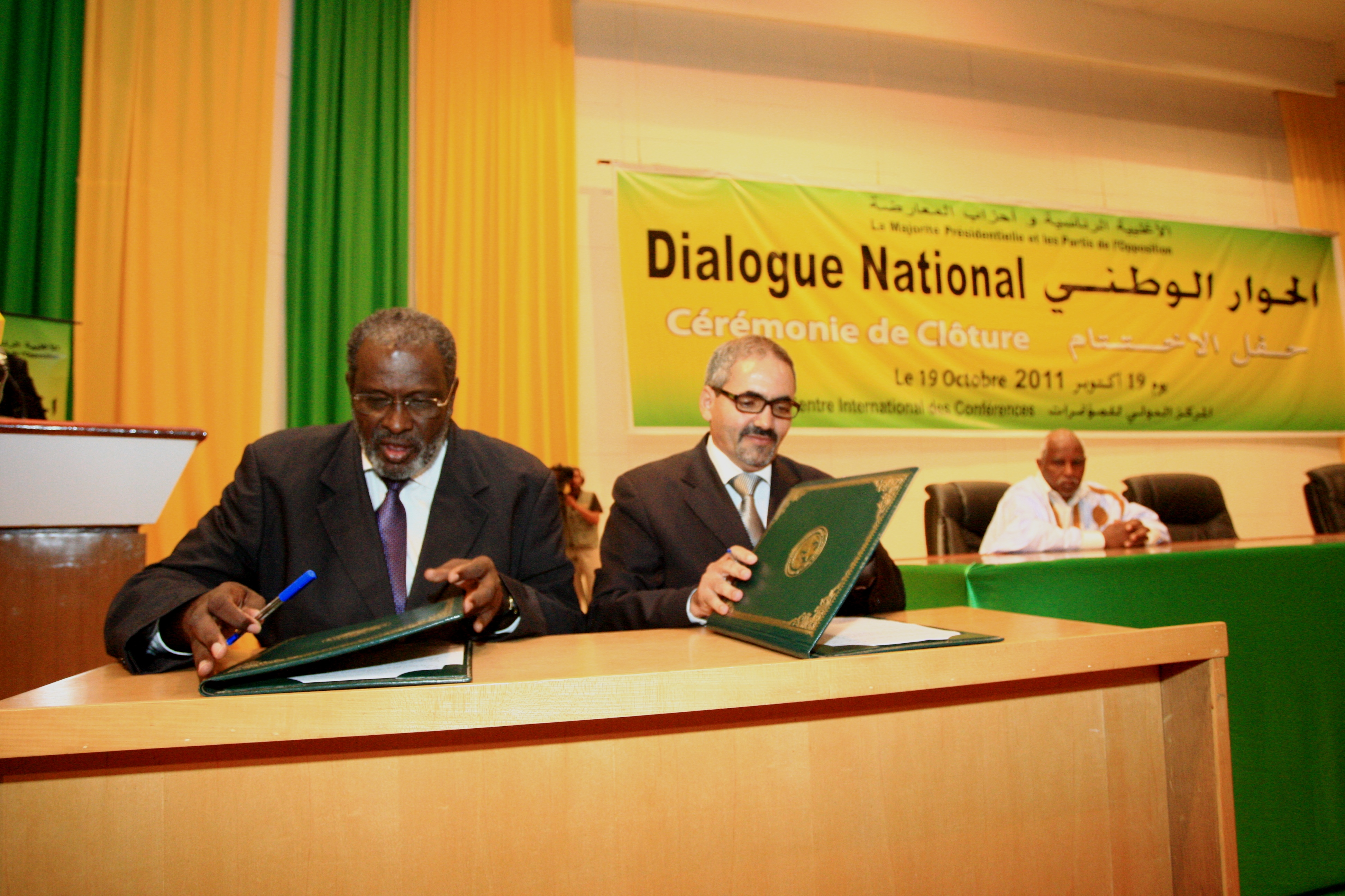 [Jemal Oumar] Political negotiations in Mauritania have led to an agreement addressing issues such as the power of parliament and the role of the prime minister. المفاوضات السياسية في موريتانيا تؤدي إلى توقيع اتفاق لمعالجة قضايا مثل سلطة البرلمان ودور رئيس الوزراء En Mauritanie, les tractations politiques ont engendré un accord portant sur un certain nombre de sujets, comme le pouvoir du parlement et le rôle du Premier ministre.